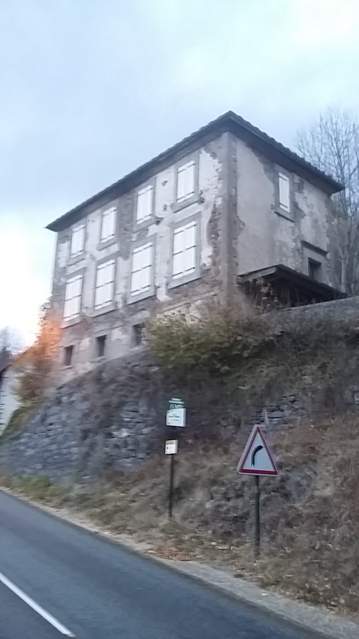 Ancienne école de jeunes filles du Village de Saint Julien, située sur le four banal